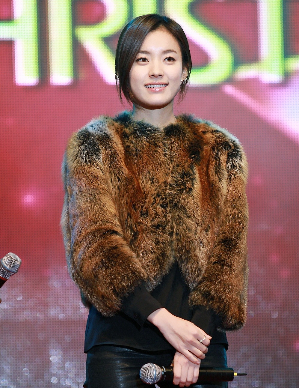 101217-롯데월드-프리크리스마스한효주